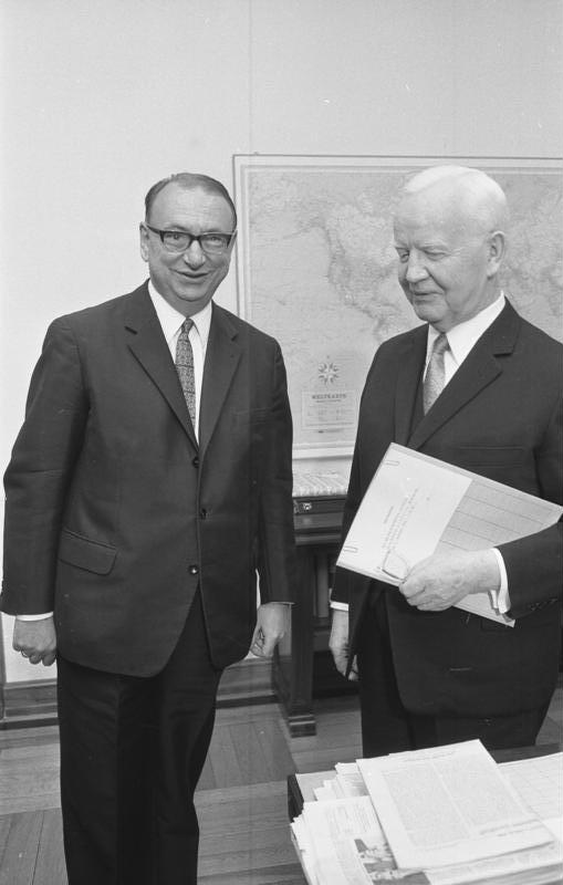 Bundespräsident Lübke empfängt den Reg. Bürgermeister von Berlin, Albertz